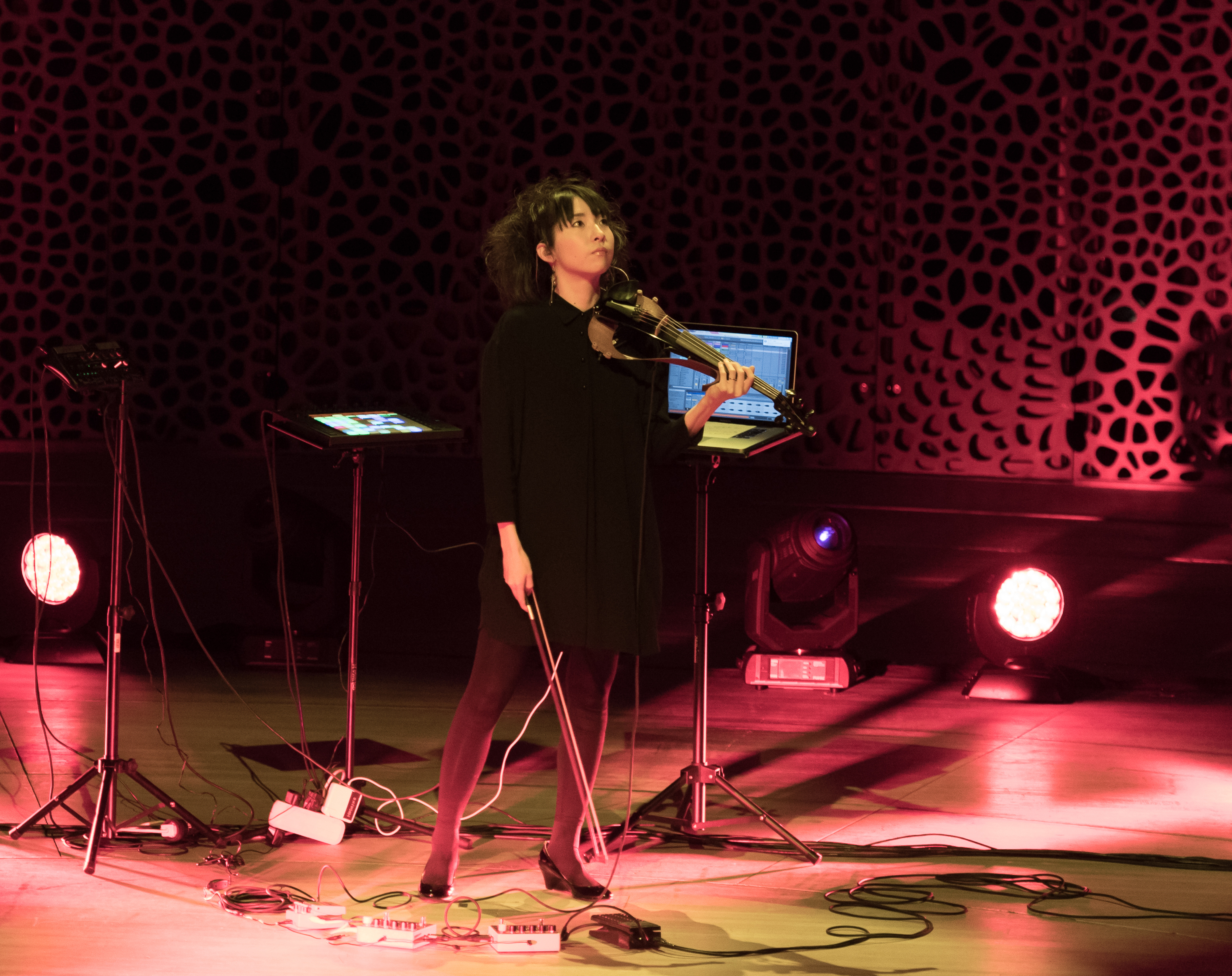 Tangerine Dream bei der Quantum of Electronic Evolution Tour in der Elbphilharmonie Hamburg 2018